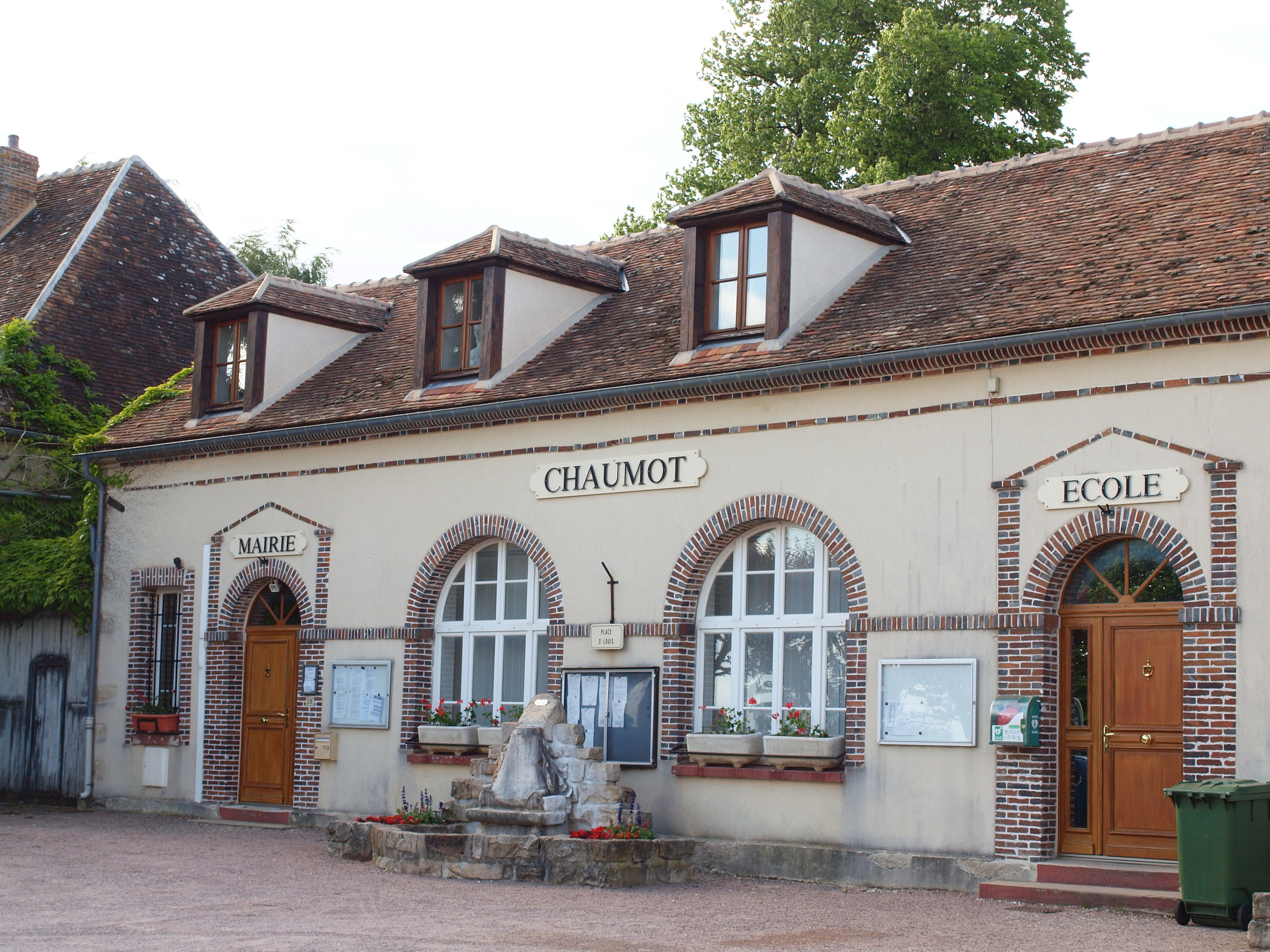 Chaumot (Yonne, France)